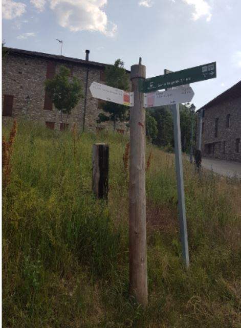 Rètol indicatiu de la ruta GR-150 al seu pas per Olià